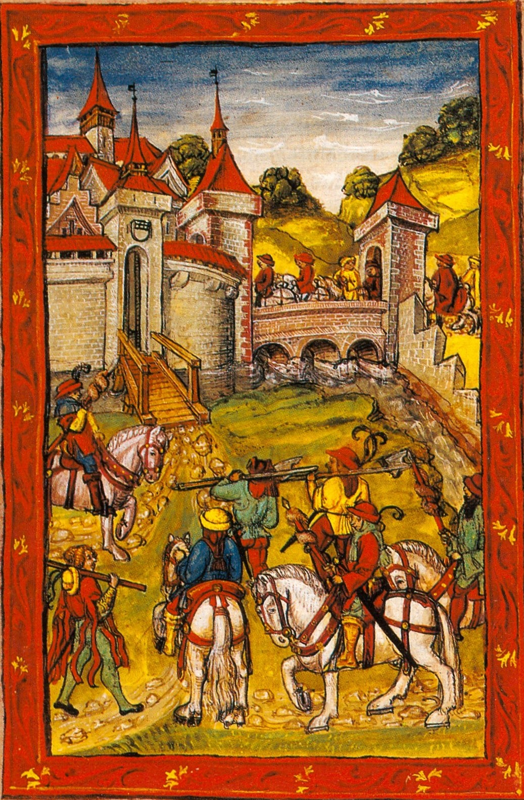 eingescannt aus: Horst Carl: Der Schwäbische Bund 1488 - 1534; Landfrieden und Genossenschaft im Übergang von Spätmittelalter zur Reformation; Leinfelden-Echterdingen, 2000; ISDN 3-87181-424-5 Die Gründung des Schwäbischen Bundes aus eidgenössischer Sicht Schwäbische Adlige reiten zur Bundesversammlung und gründen den "Jüppenbund". Die Fuchsschwänze an den Spießen symbolisieren Unehrenhaftigkeit und Heuchelei S. 460